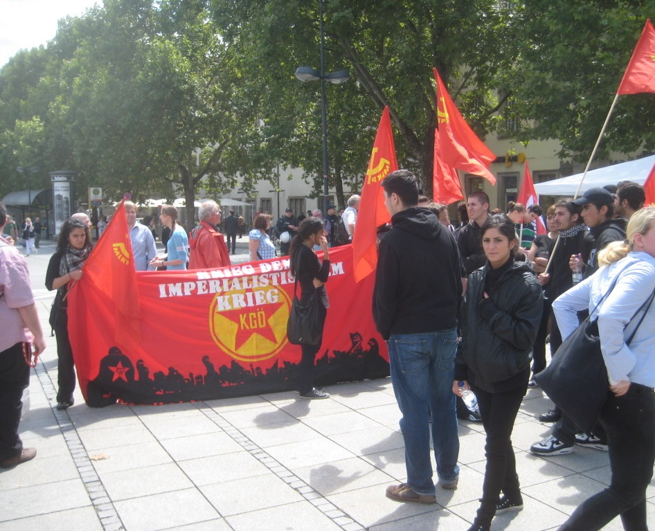 Mitglieder der türkischen MLKP/KGÖ während der Demonstration gegen das Gelöbnis der Bundeswehr auf dem Stuttgarter Schlossplatz